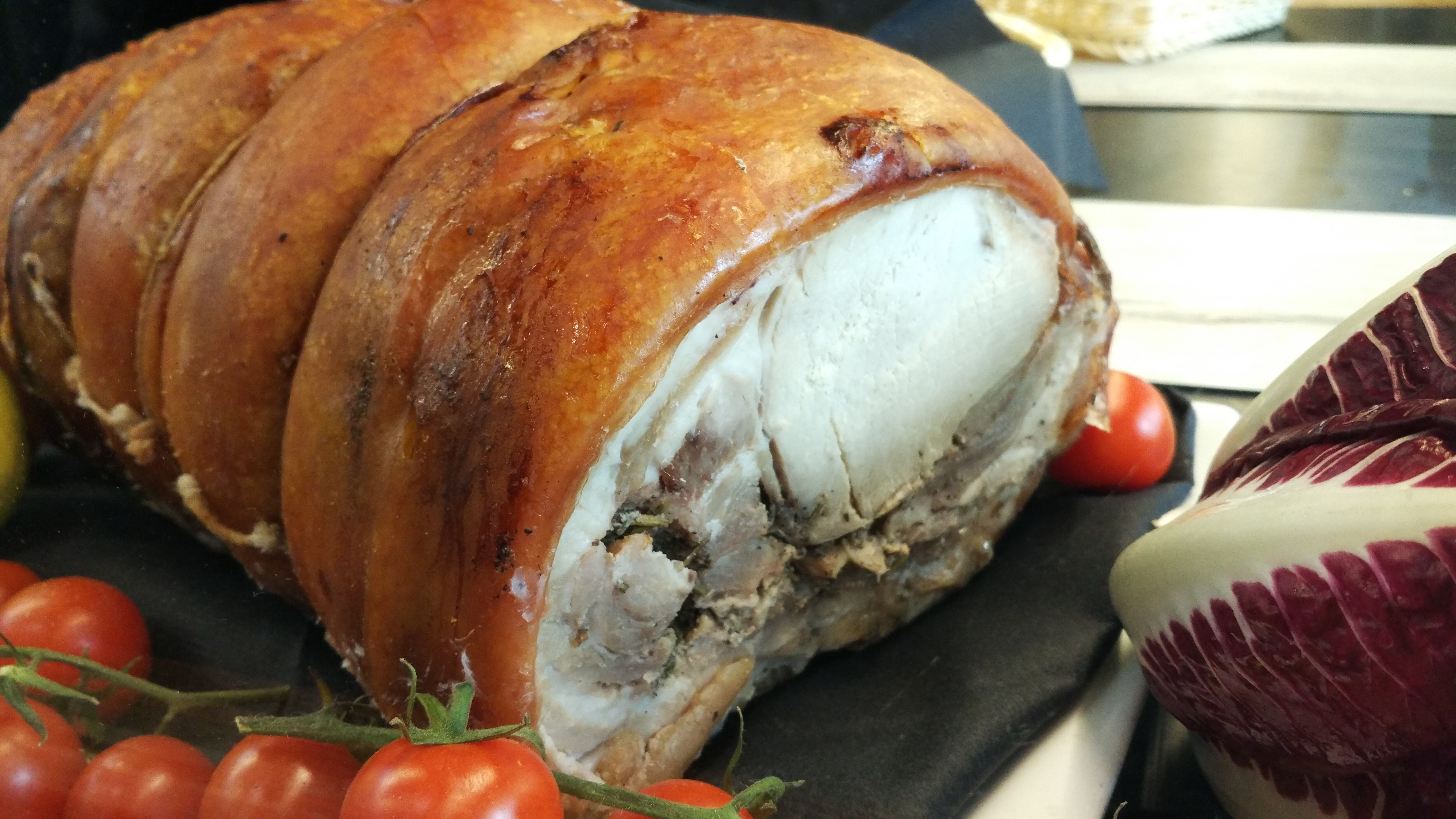 Italian porchetta